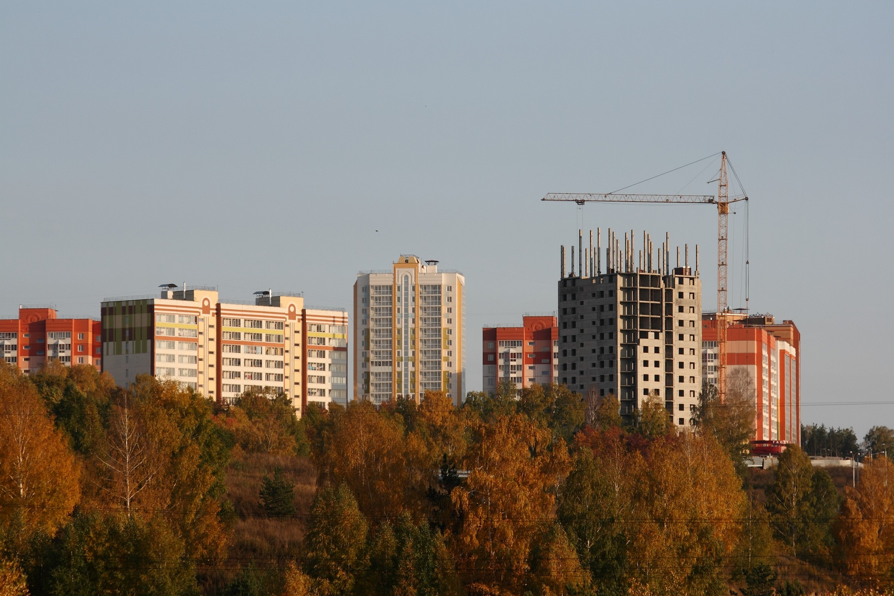 Зеленые горки